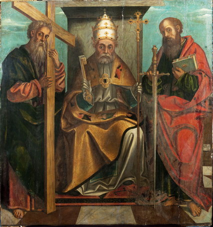 San Pedro entronizado con San Felipe y San Pablo